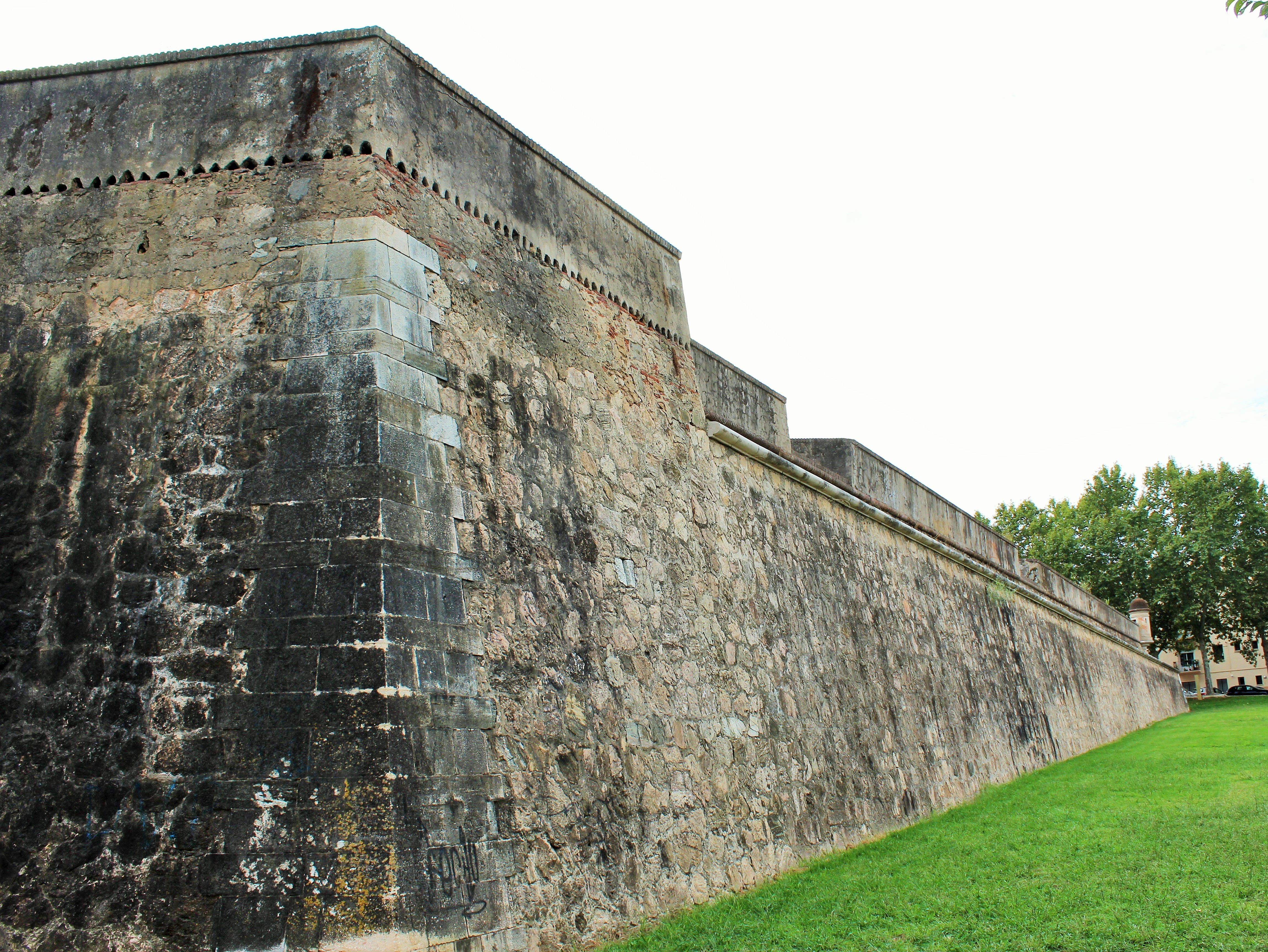 Lienzo nororiental.